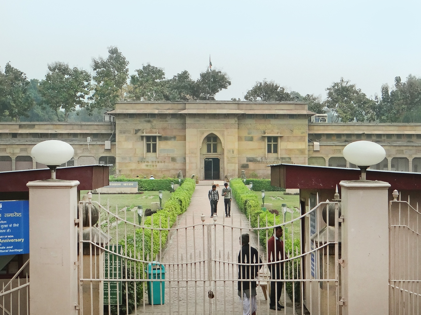 La façade du musée archéologique de Sarnath Ce musée est le plus ancien géré par l'Archaeological Survey of India. Construit à l'initiative de Sir John Marshall, alors directeur général de l'Archéologie aux Indes, les plans sont dessinés pas James Ramson et le musée ouvre ses portes au public en 1910. Il expose des pièces datant du IIIe siècle av. J.-C. au XIIe siècle de l'ère chrétienne. On peut y admirer le chapiteau aux lions de l'époque de l'Empereur bouddhiste Ashoka dont la représentation figure sur les billets indiens (il y est strictement interdit de photographier) _________________ Sârnâth est à 10 km de Varanasi, l'ancienne Bénarès. C'est un site majeur du Bouddhisme car, après avoir atteint l'Eveil, le Bouddha a prononcé, sous l'arbre de la Bhodi (Eveil), dans le parc des gazelles de Sârnâth, son premier sermon devant ses cinq premiers disciples. Cet évènement majeur est appelé la Mise en Mouvement de la Roue du Dharma (ou de la Loi) car il marque le début de l'enseignement et de la diffusion de la doctrine à travers le monde. Au-dessus des temples bouddhistes de la tradition tibétaine, on peut voir une roue à rayons, qui représente la Roue du Dharma, et qui est regardée par deux gazelles en référence au premier sermon. L'Empereur bouddhiste Ashoka fit ériger, au IIIème siècle avant J.-C., à l'endroit du premier sermon un stûpa et une colonne gravée, dite Édit du Schisme. Par la suite, plusieurs grands monastères se sont développés à Sârnâth jusqu'à leur destruction par les envahisseurs musulmans à l'époque médiévale. Le site de Sârnâth est devenu un lieu de pèlerinage. Plusieurs temples et monuments commémoratifs y ont été construits, des fouilles archéologiques ont permis de mettre en valeur le site et un musée a été créé. Article de Wikipedia sur Sârnâth référence : le Bouddhisme, sous la dir. de K. Trainor, Evergreen, Taschen, 2007